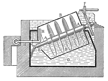 Schraubengebläse (Cagniardelle). A – Hohlwelle B – Blechmantel C – blecherne Schraubengewinde E – Öffnung zum Wasseraustritt F – Getriebe G – Wasserbasin H – Rohr